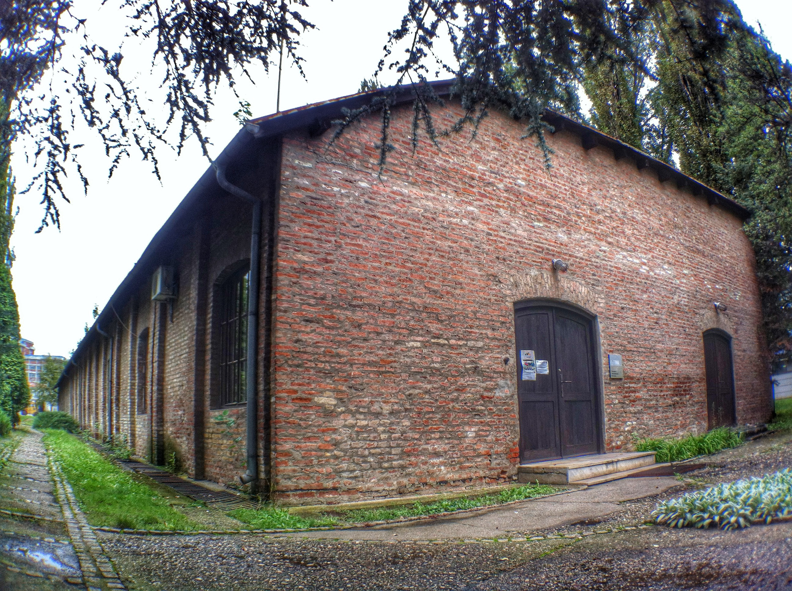 Српски (ћирилица): Радионица се налази у комплексу "Гоша" у С.Паланци.